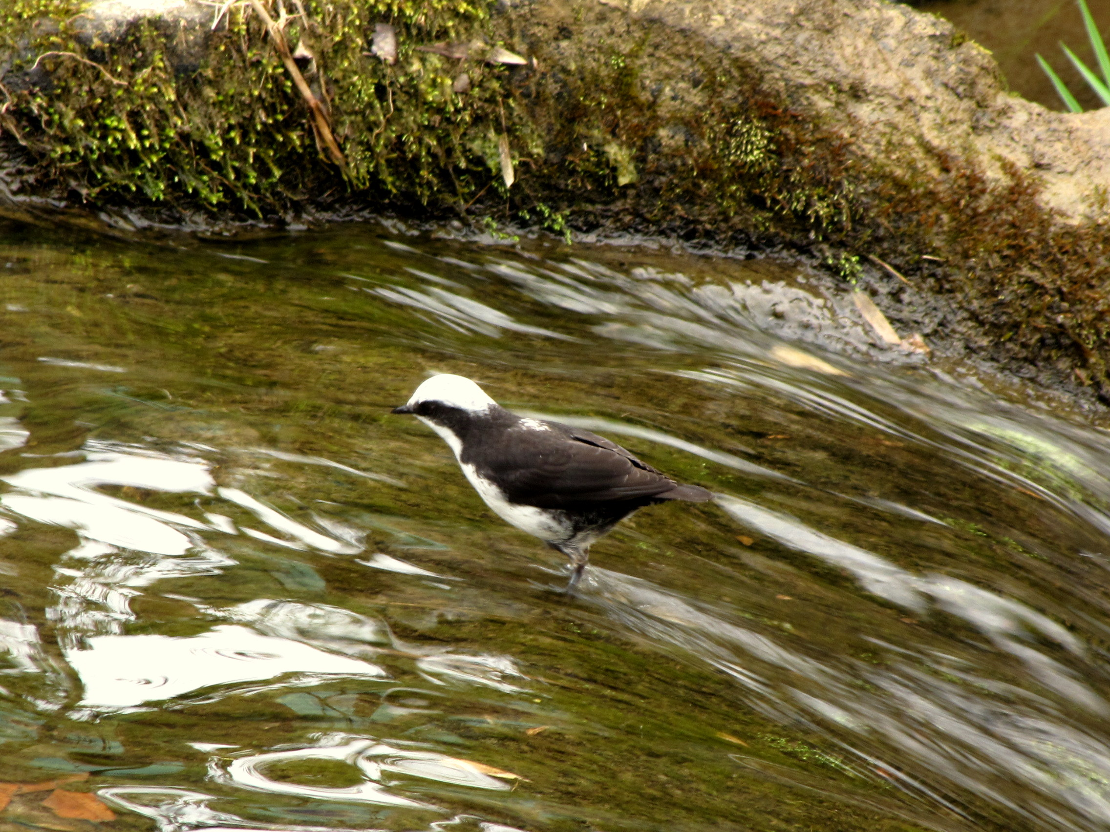 Cinclus leucocephalus (Mirlo acuático)